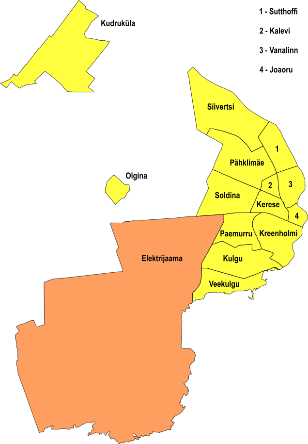 Elektrijaama linnaosa (Narva)